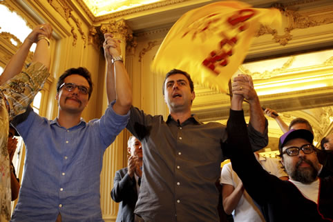 Agora é oficial. Na Convenção Eleitoral do PSOL, realizada nesta segunda-feira (11/6), o partido lançou Marcelo Freixo candidato a prefeito do Rio e Marcelo Yuka a vice. Wagner Moura representou a classe artística que apoia a campanha do PSOL.